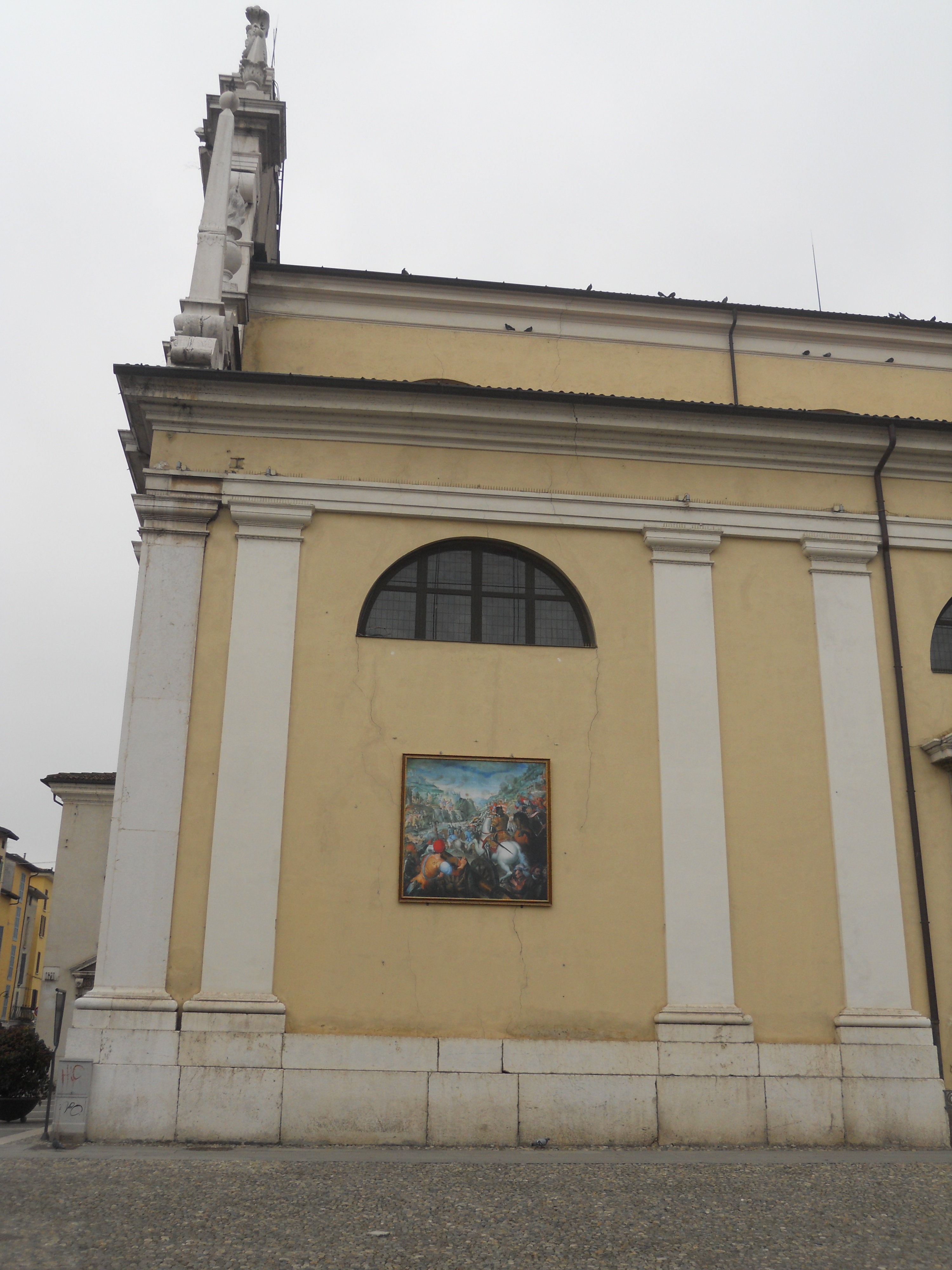 San Faustino maggiore (Brescia) (esposizione)